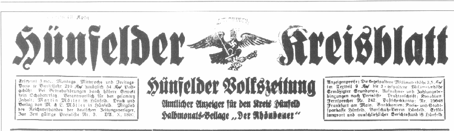 Titelkopf des Hünfelder Kreisblatts